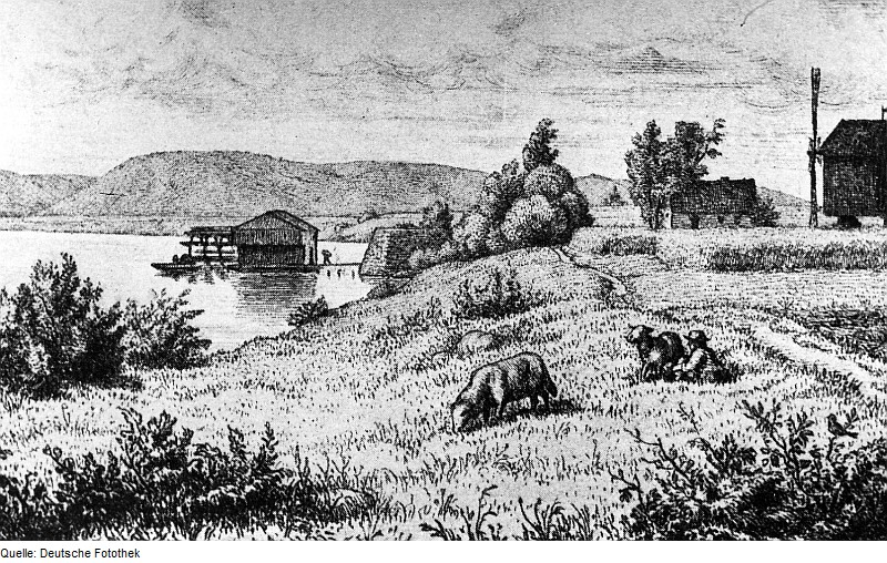 Original image description from the Deutsche Fotothek Coswig-Kötitz. Windmühle am Elbufer und Schiffsmühle in der Elbe, aus: Bilder-Atlas zur Sächs. Geschichte 1909